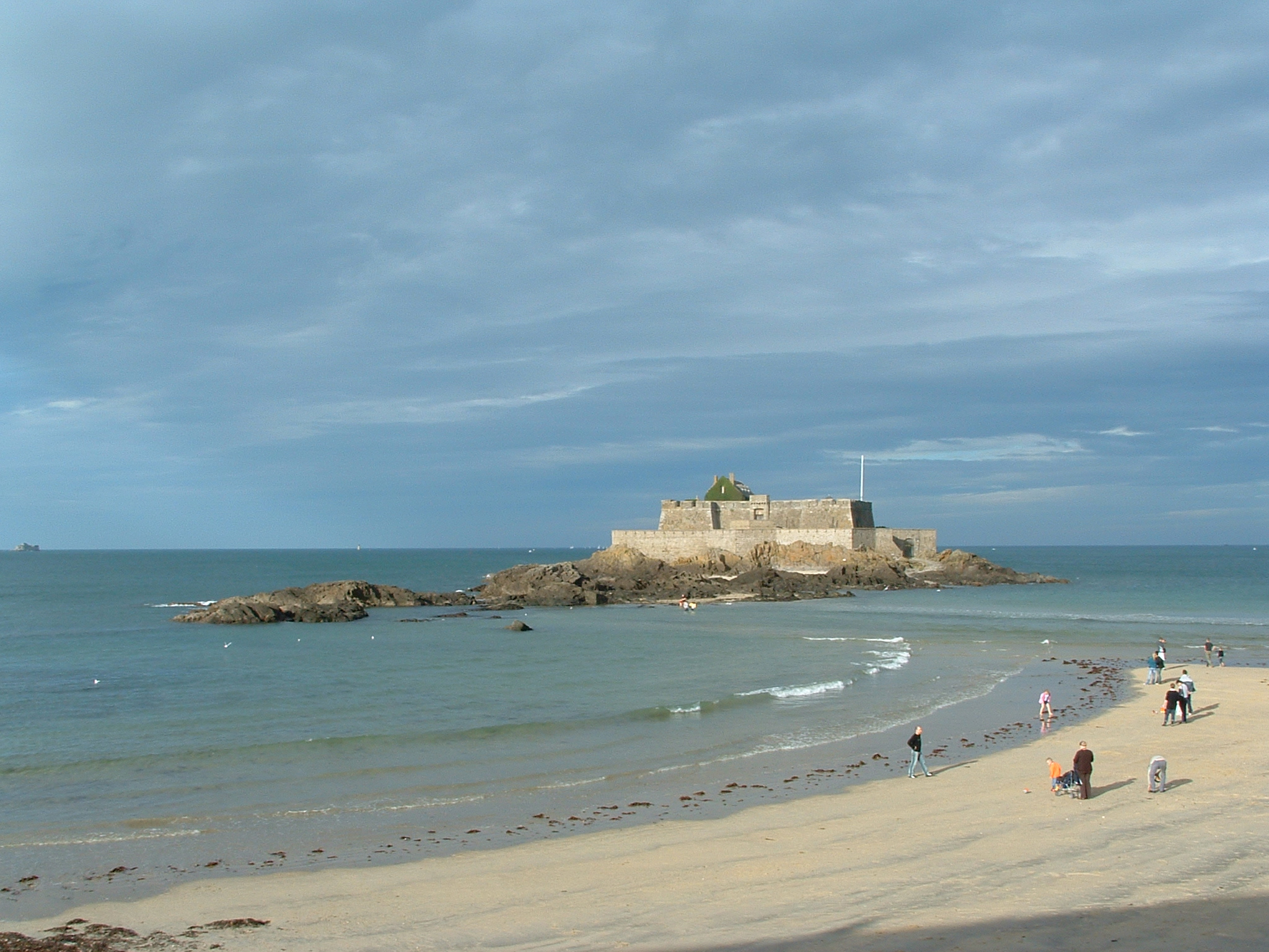 Le Fort National par marée basse, vu des remparts de Saint-Malo, en arrière plan à gauche, le fort de la ConchéeThe Fort National at middle tide, seen from Saint-Malo walls. In the background, on the left, the fort de la Conchée.